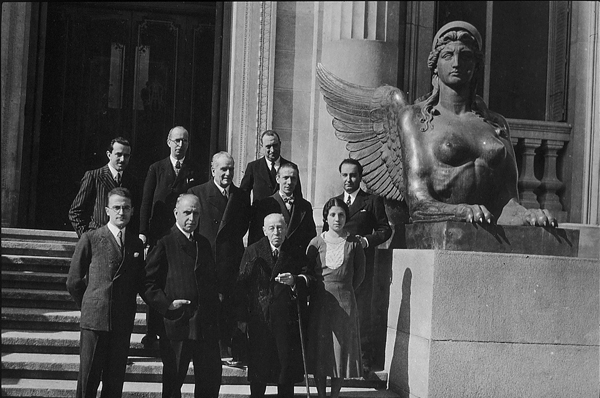 Felipe Mateu y Llopis. Es el segundo de la fila inferior empezando por la izquierda.